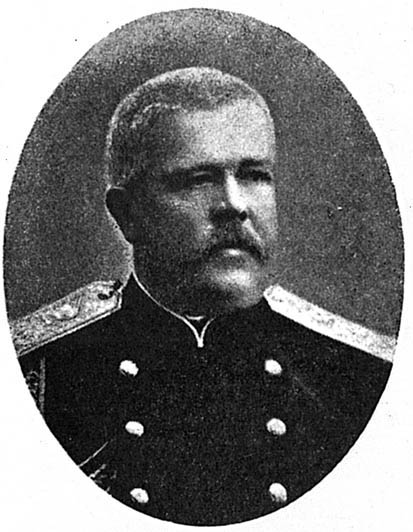 Генерал А. Р. Дрентельн. Это изображение было использовано для иллюстрирования статьи «Дрентельн, Александр Романович» опубликованной в девятом томе «Военной энциклопедии», который был издан книгоиздательским товариществом И. Д. Сытина в 1912 году в столице Российской империи городе Санкт-Петербурге.